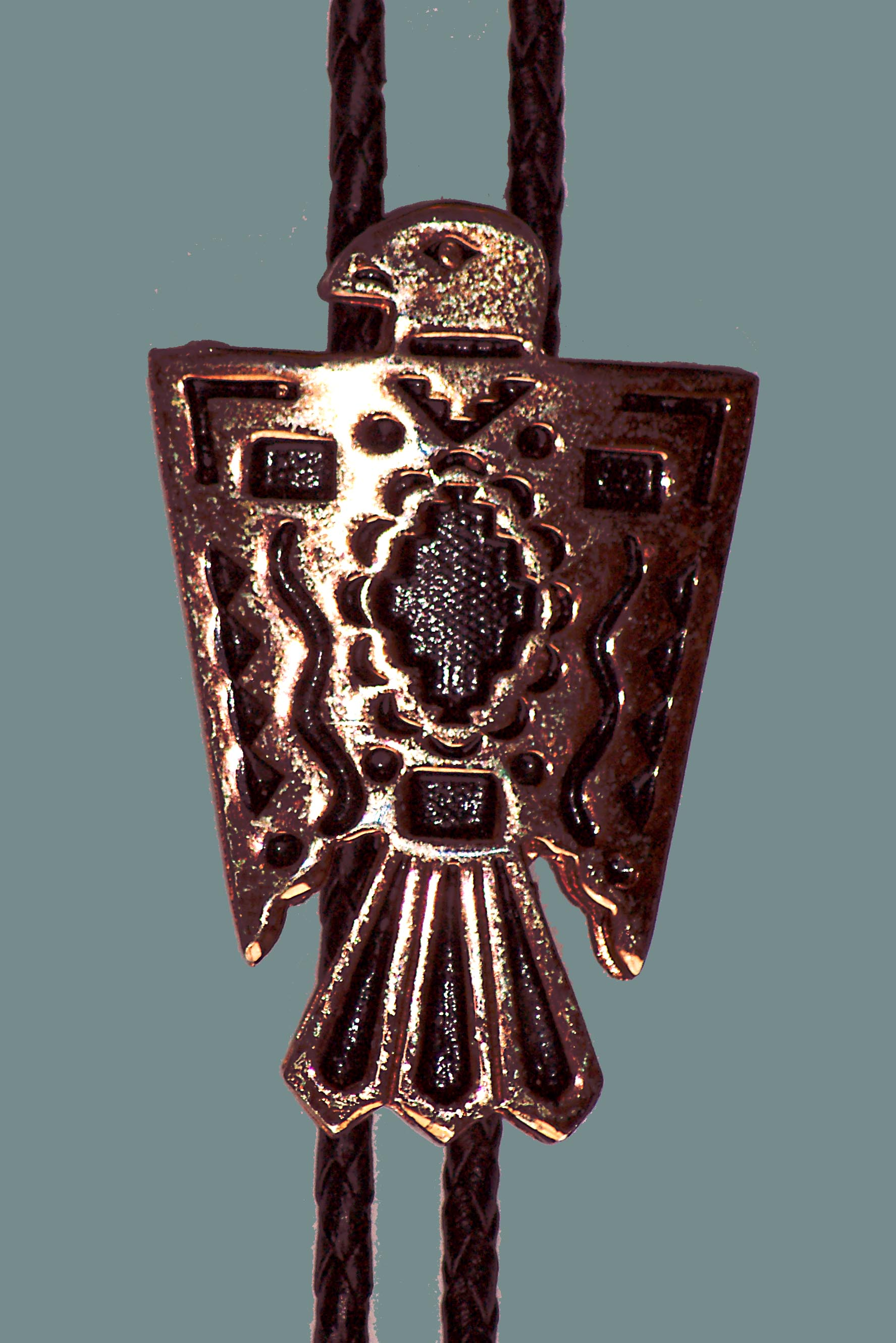 Bolotie, Adler aus Kupfer, Kalifornien